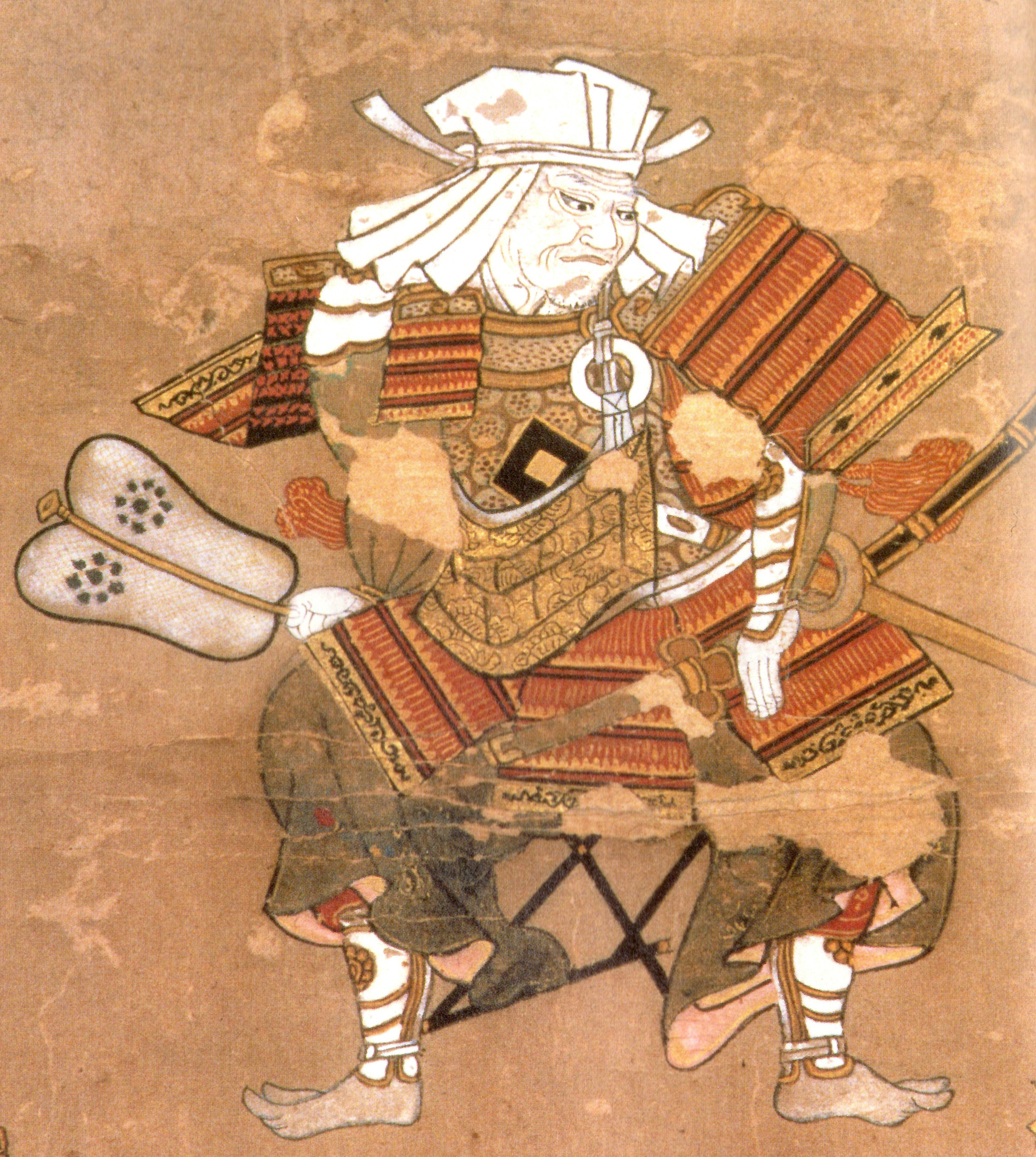 大田原晴清の肖像。